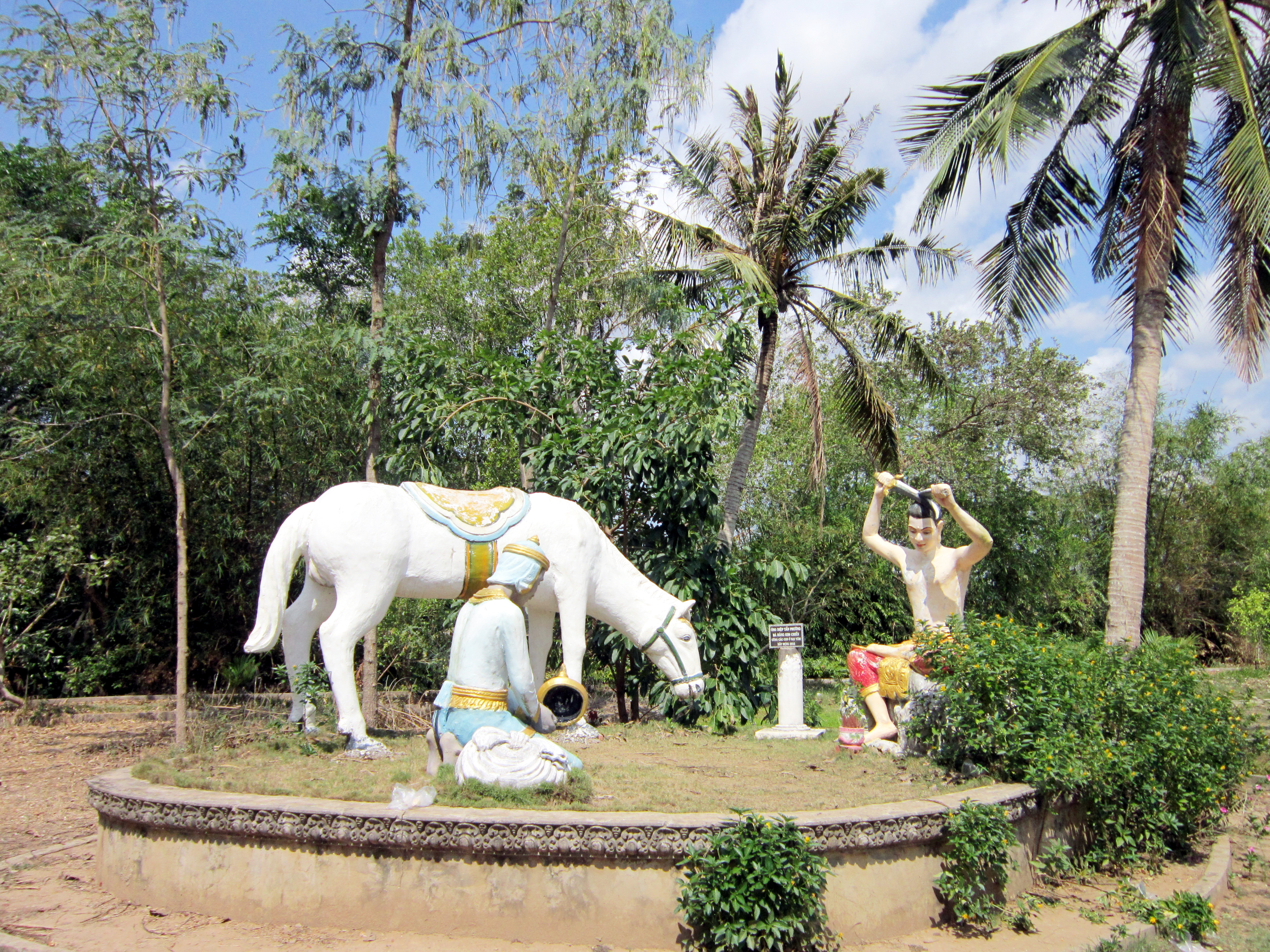 Bộ tượng nhắc tích Thái tử Tất-đạt-đa (sau này là Phật Thích Ca) cắt tóc đi tu để tìm cách diệt khổ, hiện đặt trong khuôn viên chùa Sà Lon thuộc Sóc Trăng (Việt Nam).